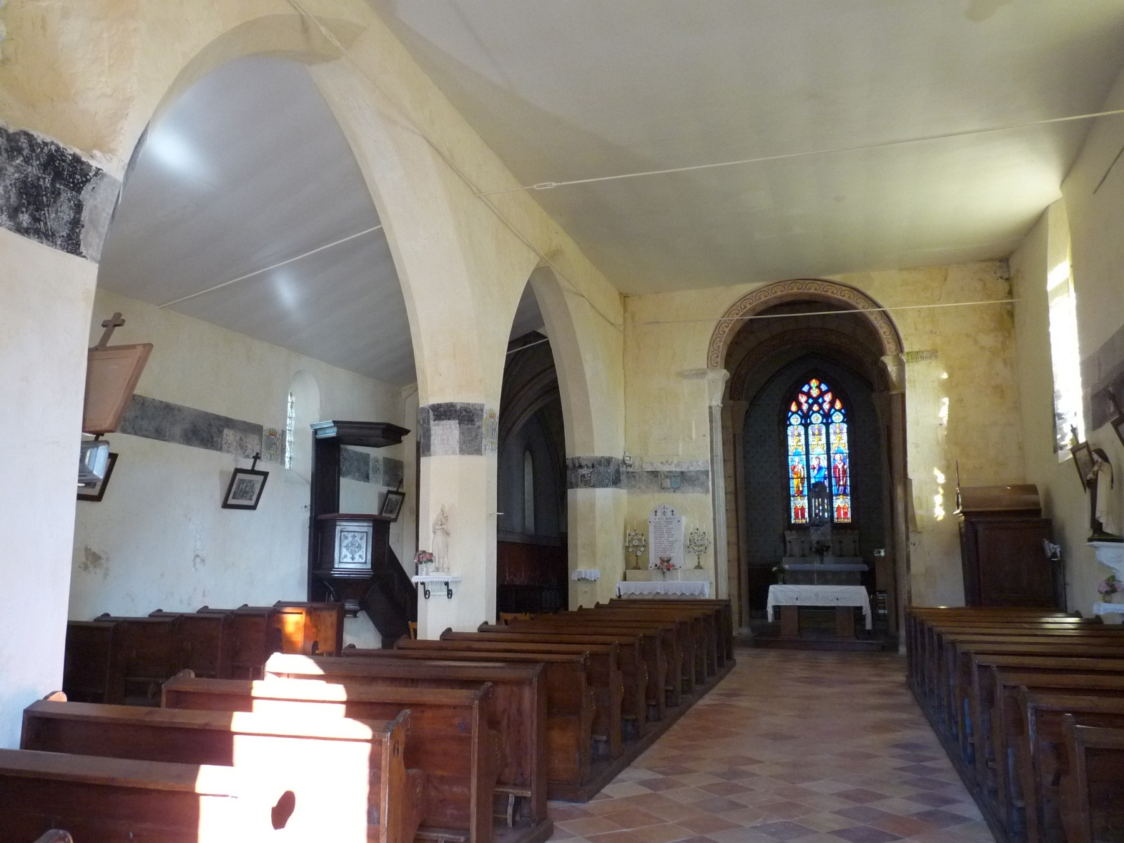 Eglise de Consac, Charente-Maritime, France